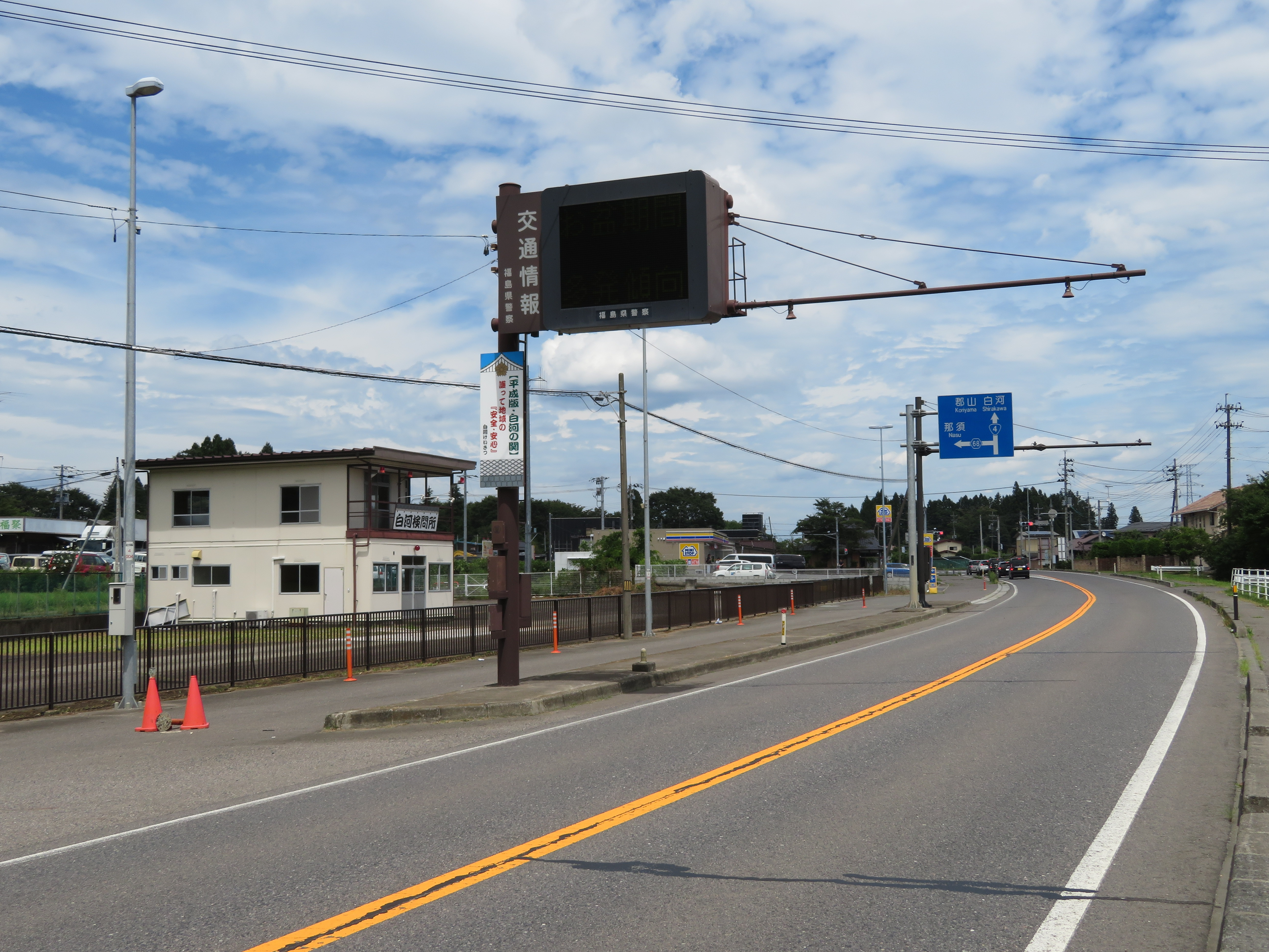 国道4号線福島県西郷村大字小田倉稗返（白河検問所）付近（白河方面を撮影）